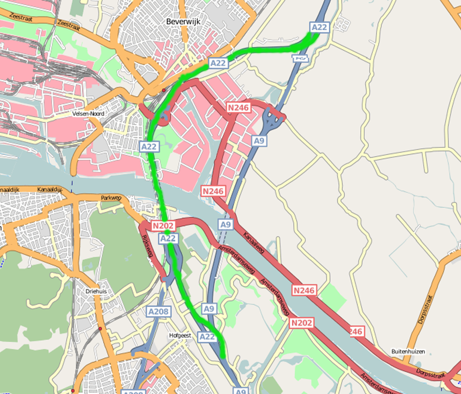 Detailkaart van de RW22